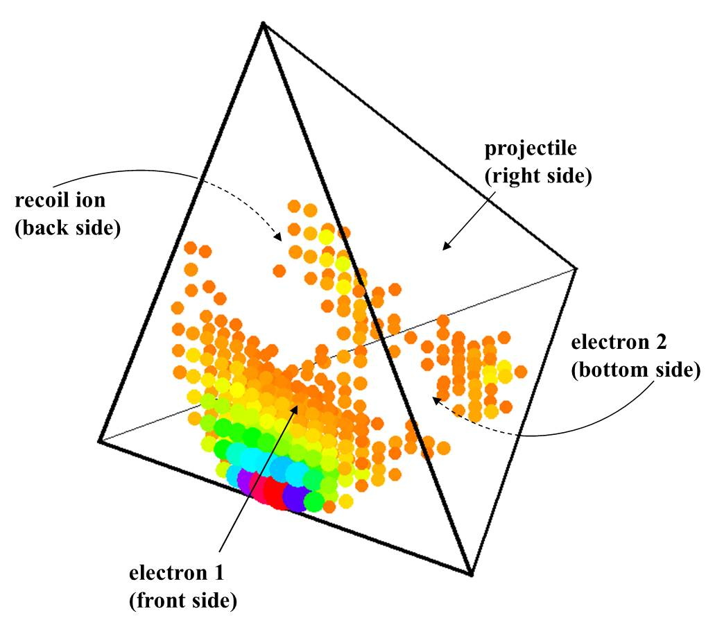 4-Teilchen Dalitz Diagramm fuer Doppel-Ionisation von Helium durch 6 MeV Protonen-Stoss. Die Abstaende eines Datenpunktes zu den 4 Tetraeder-Seiten repraesentieren die Dalitz-Koordinaten der jeweiligen Teilchen